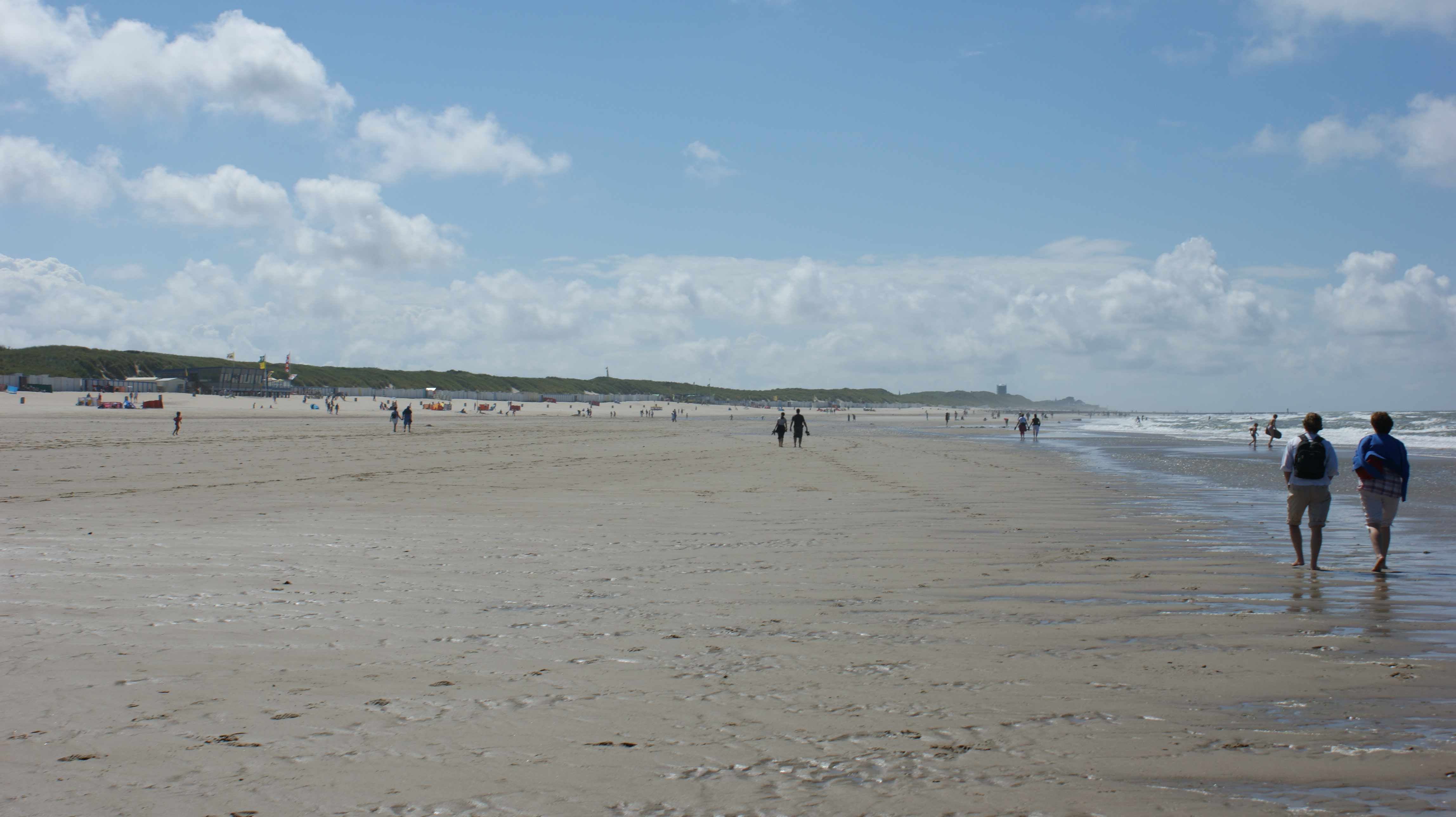 Zicht op een deel van het strand nabij Oostkapelle